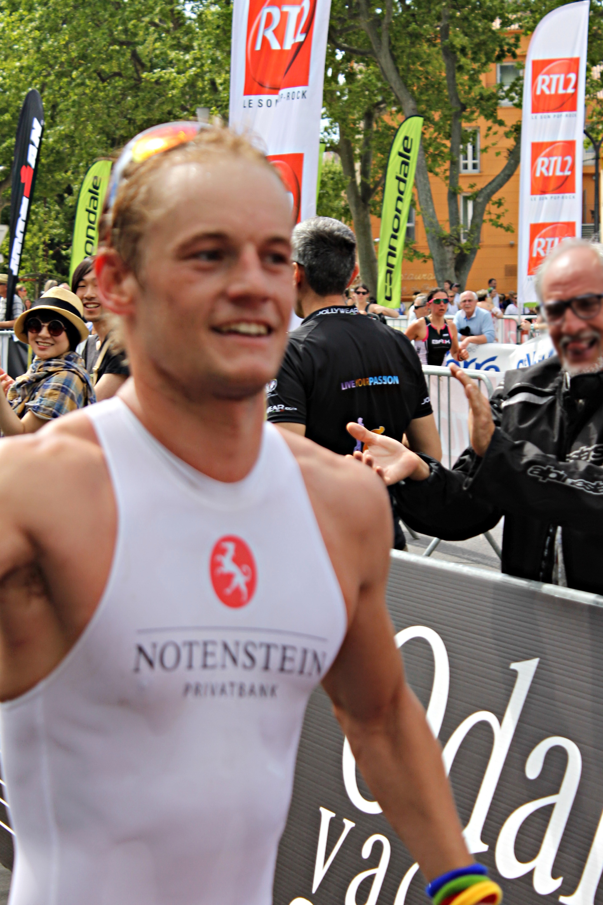 Jan Van Berckel 3e Ironman Pays d'Aix 2015